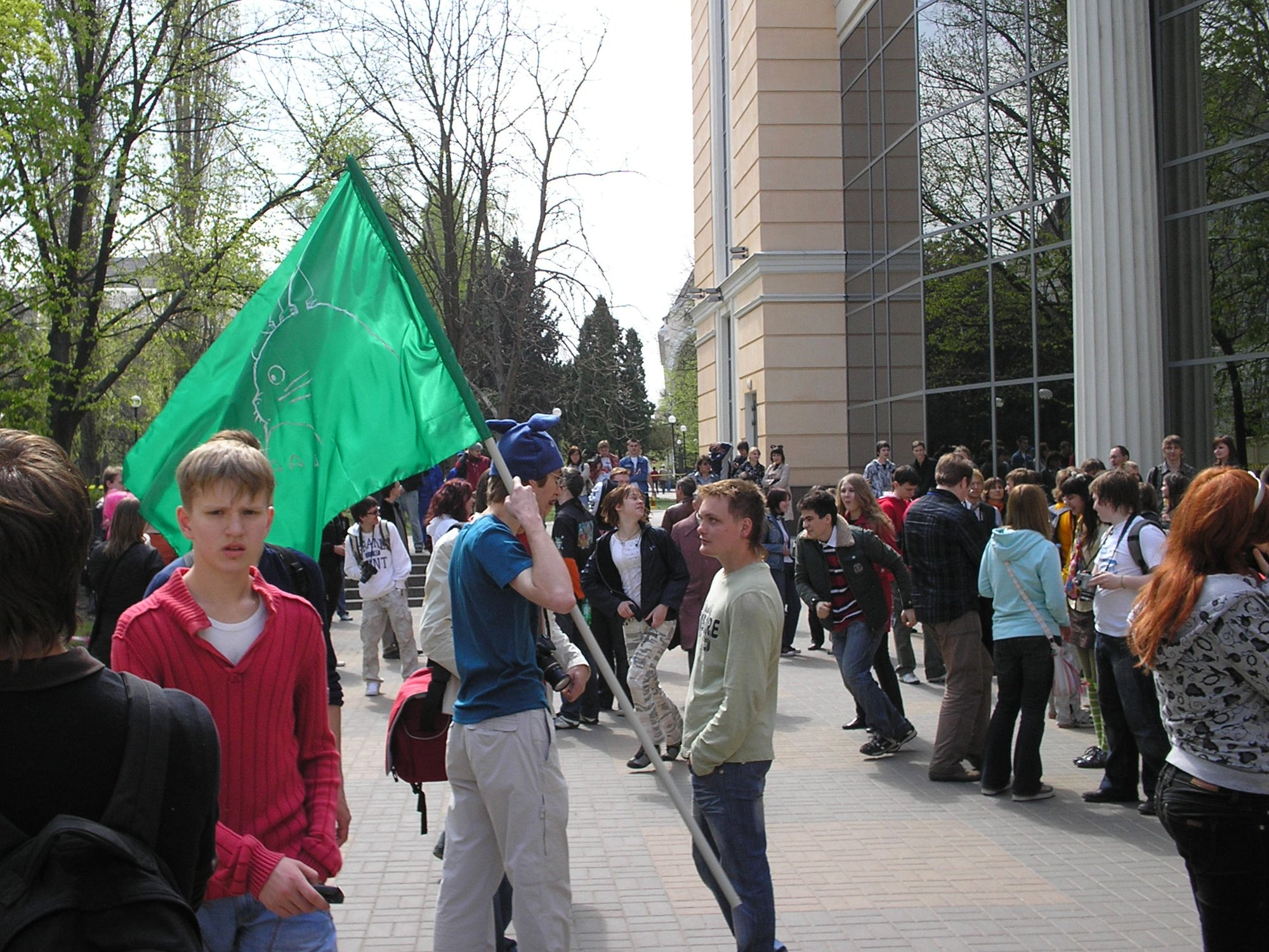 У кинотеатра «Спартак» в Воронеже перед открытием десятого юбилейного всероссийского фестиваля японской анимации